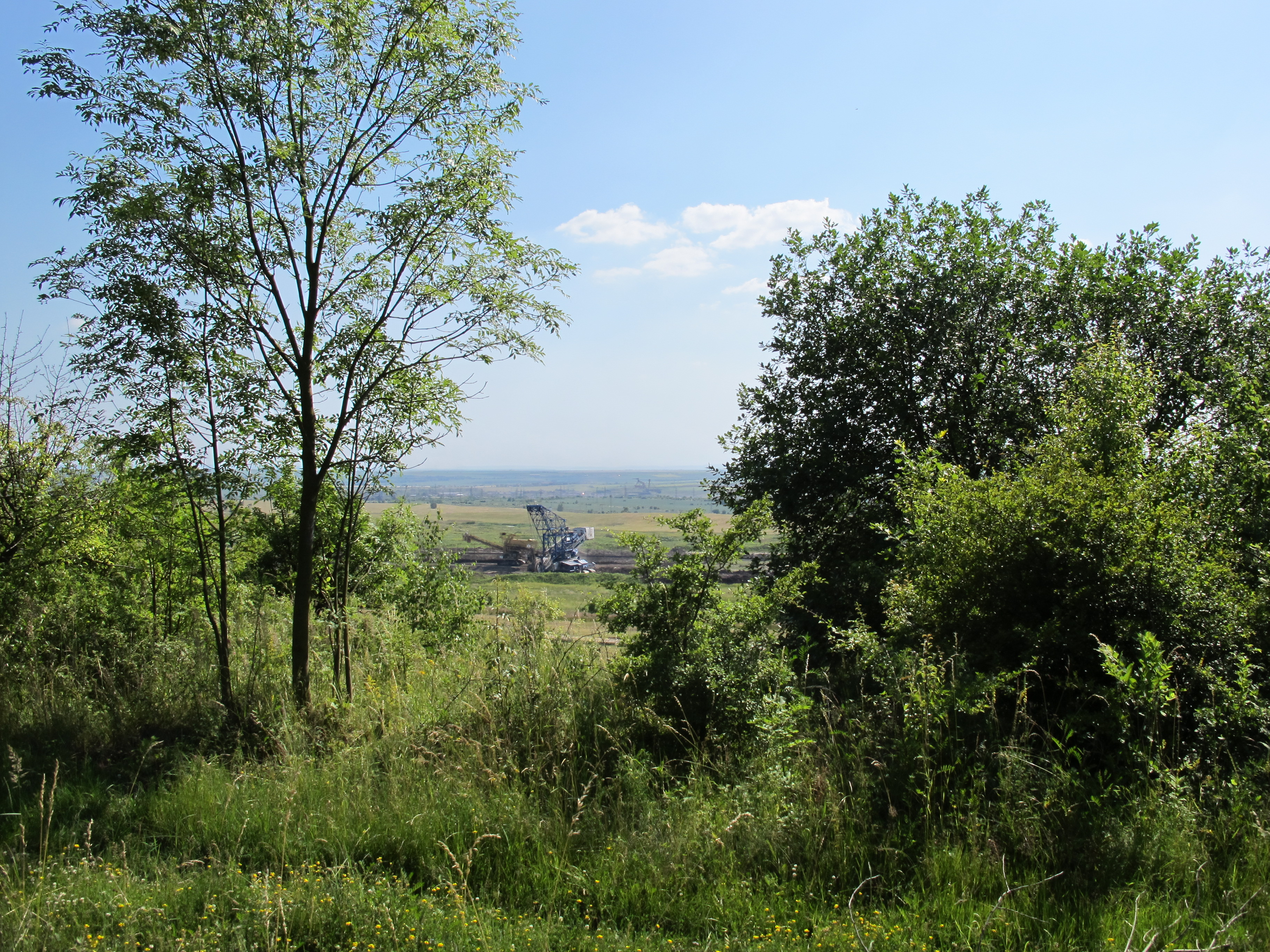 Slatinická výsypka - pohled z Resslu